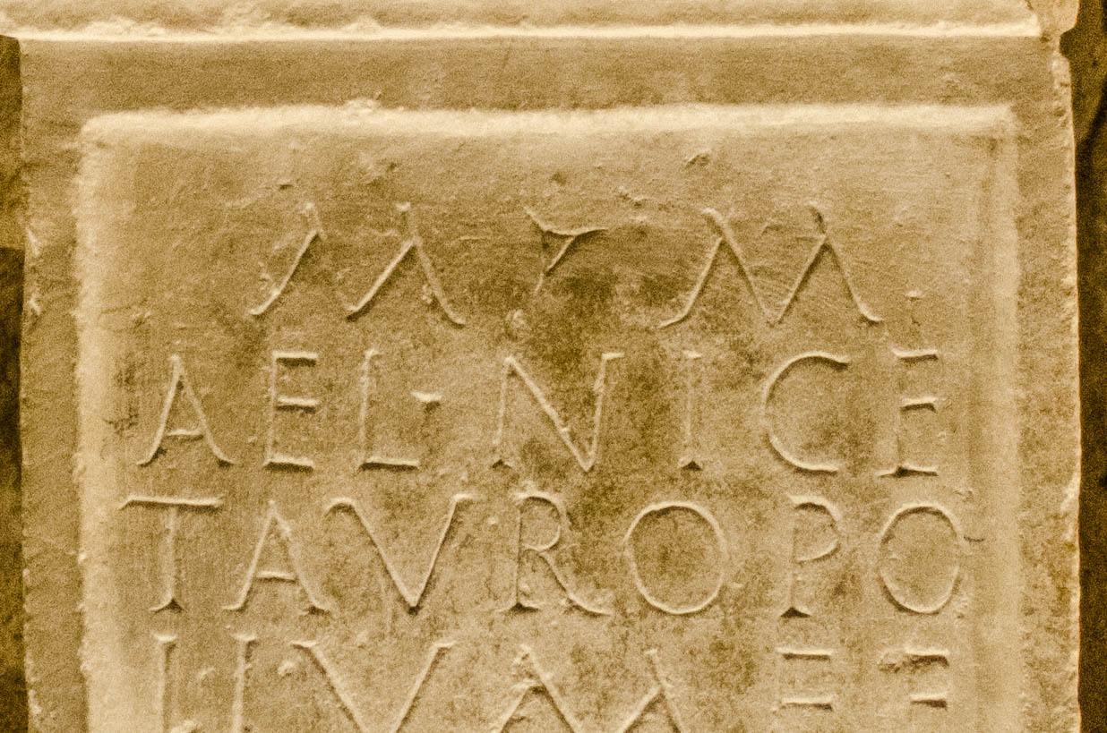 Hedera stylisée (première ligne, entre les deux M), autel taurobolique d’Aelia Nice, Musée Eugène-Camoreyt de Lectoure (Gers, France)